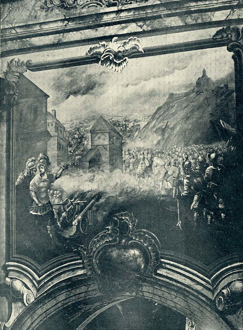 Беларуская (тарашкевіца): Амсьціслаў (Amścisłaŭ). Фрэскі ў касьцёле кармэлітаў: узяцьце маскоўскімі войскамі замка